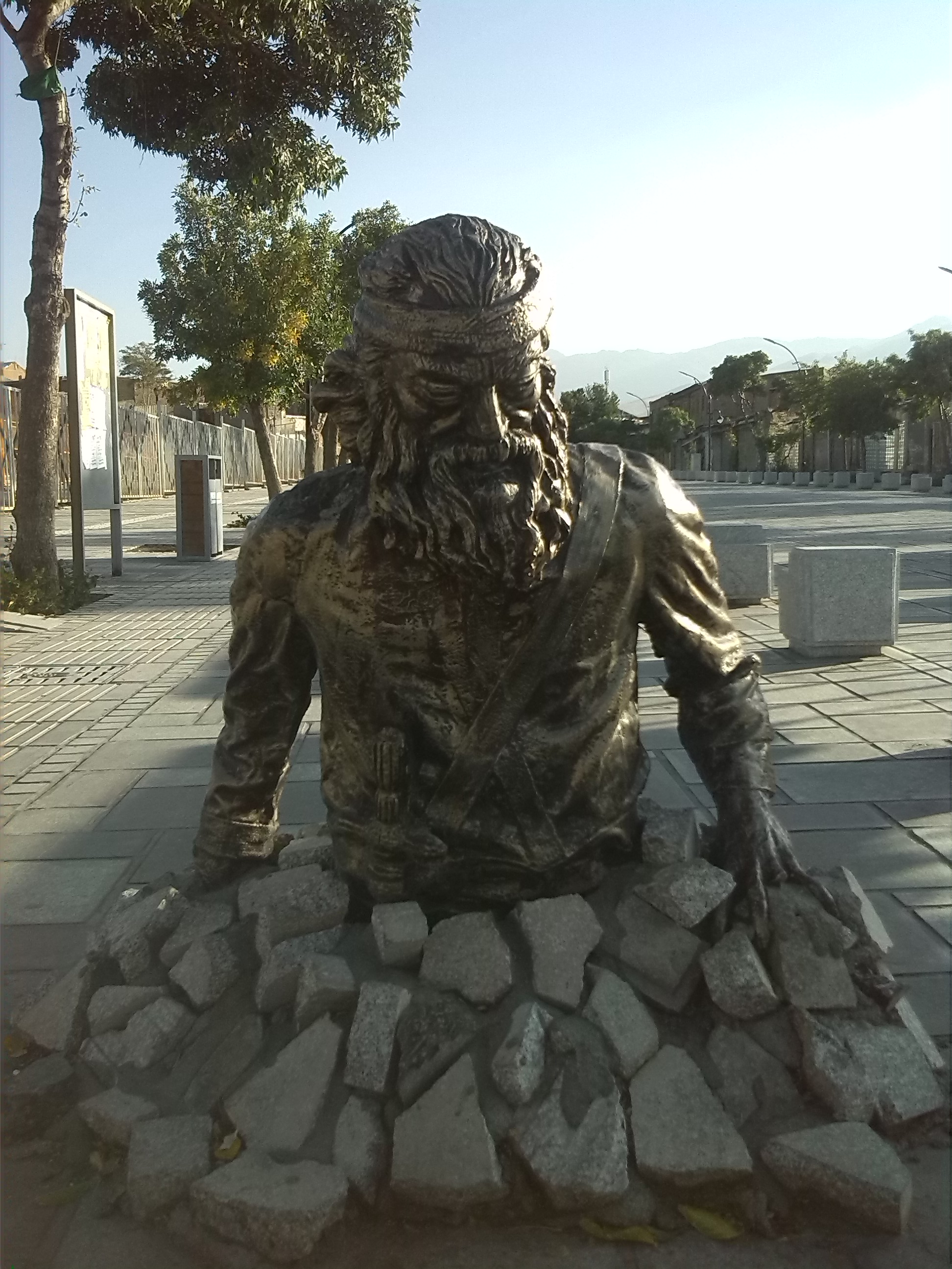 تندیس سرداری مادی نصب شده در تپه باستانی اکباتان